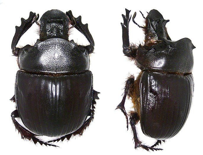 Familie: Scarabaeidae Grösse: 40-55 mm Verbreitung: Ostafrika, Mocambique, Simbabwe, Namibia Fundort: Namibia, Omaruru leg. det. U.Schmidt, 1994 Foto: U.Schmidt, 2005